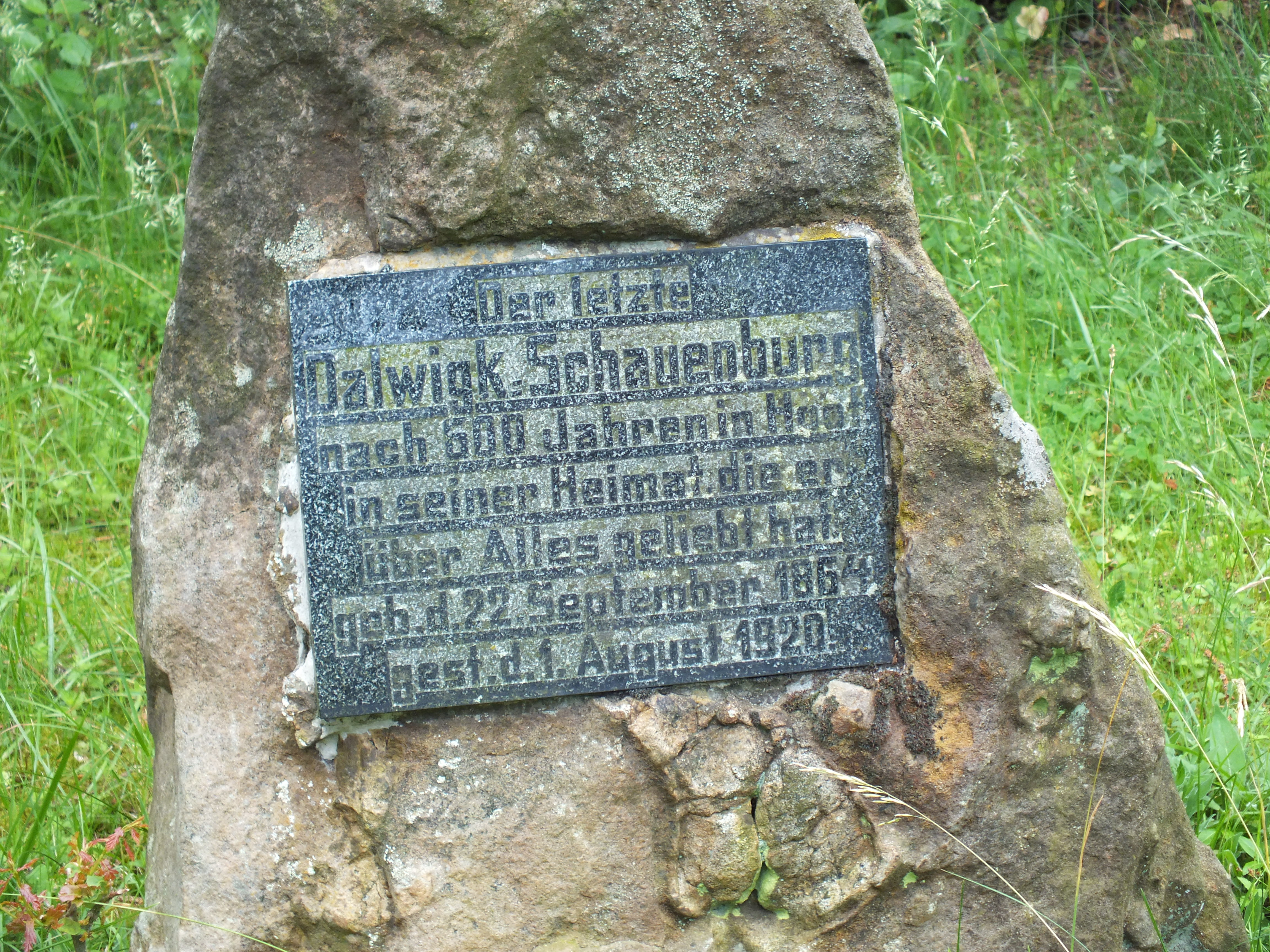 Grabstein am Wolwerskopf: "Der letzte Dalwigk-Schauenburg, nach 600 Jahren in Hoof, in seiner Heimat die er über Alles geliebt hat. geb.d.22.September 1864, gest.d.1.August 1920"